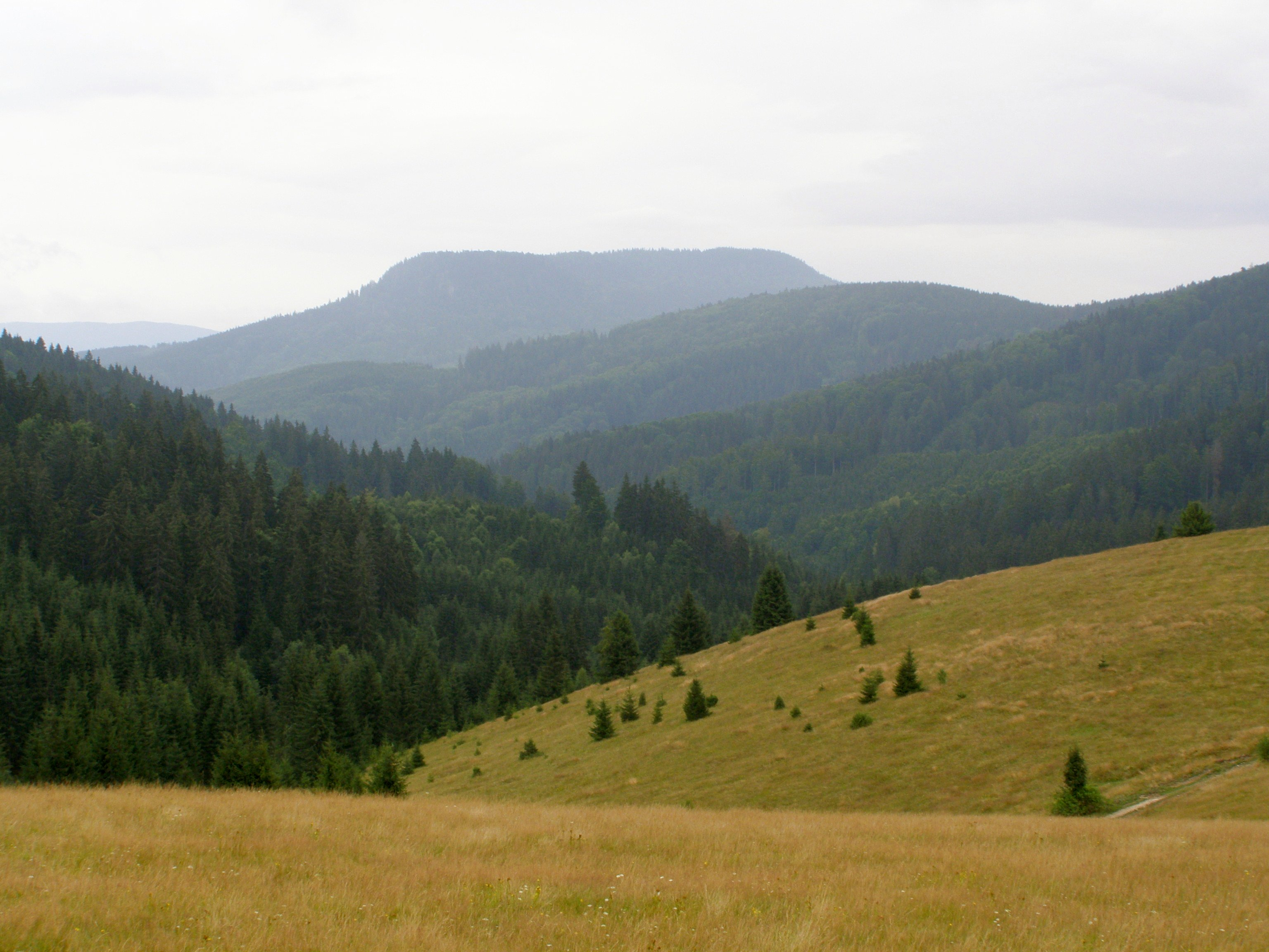 Česky: Slovenské rudohoří, Veporské vrchy, Balocké vrchy, pohled z osady Kysuce na severovýchod, vzadu Klenovský Vepor (1338 m)